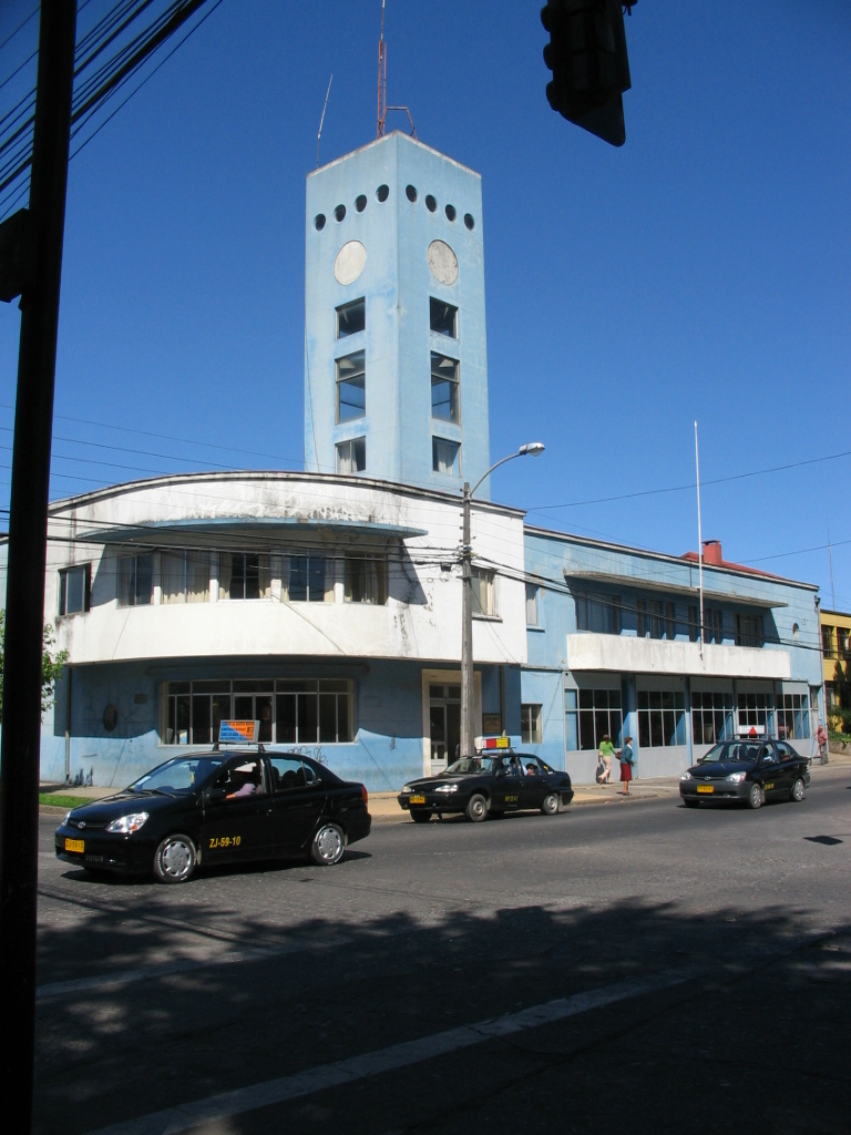 Compania de bomberos de los angeles Chile